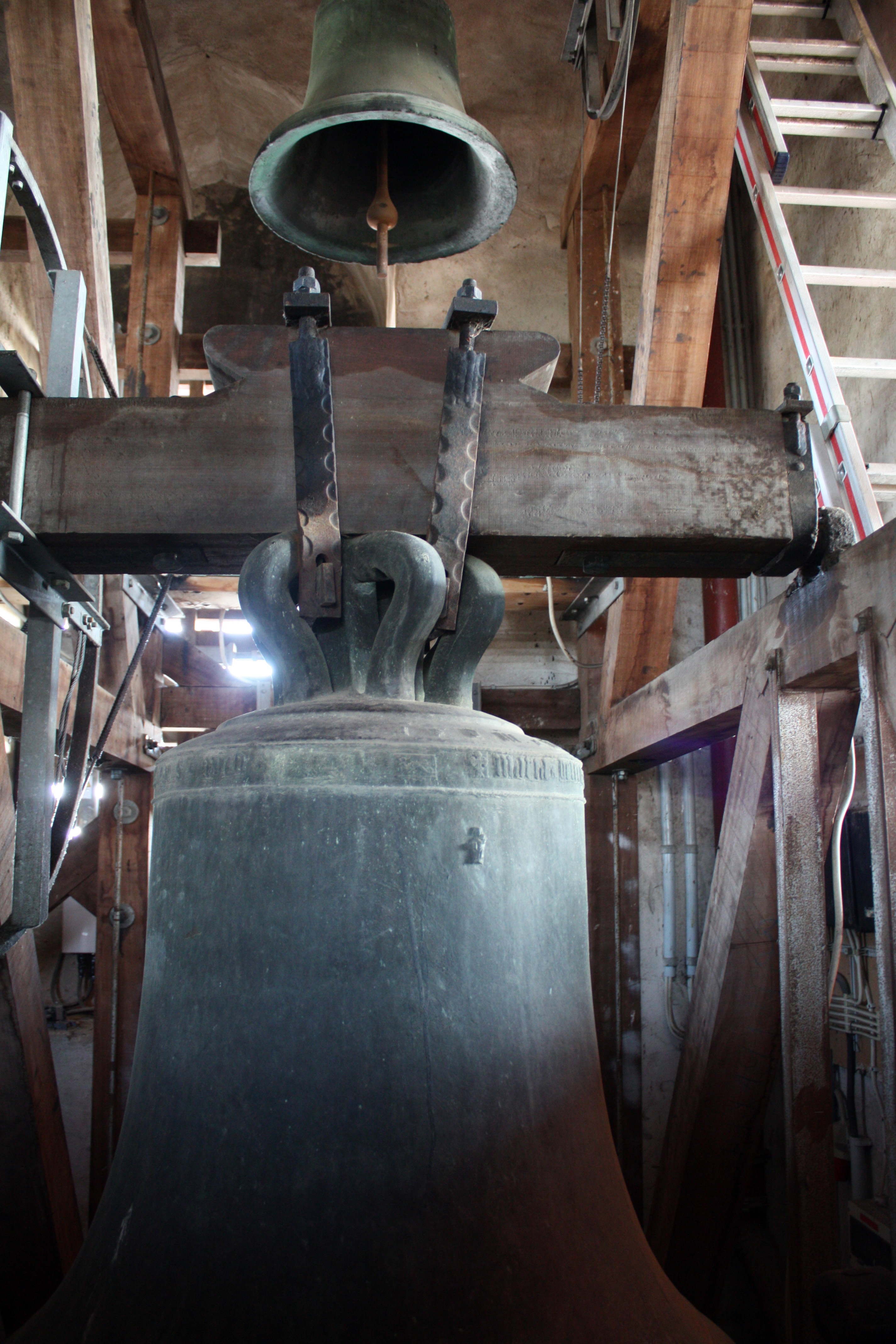 Friesheim,Glockenstuhl der St. Martinkirche.In ihm hängen fünf Glocken unterschiedlicher Größe